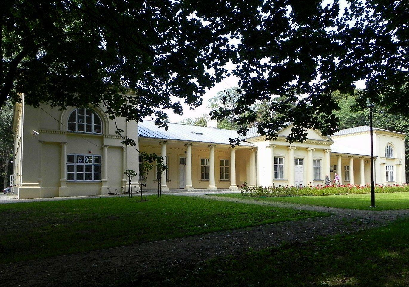 Obecny samodzielny Publiczny Zakład Opieki Zdrowotnej w Garbowie Pierwotnie dwór a następnie fragmenty dworu ykorzystano przy wznoszeniu obecnie istniejącego pałacu. W 1819 roku Garbów kupił Jan Jezierski, który w połowie XIX wieku powierzył budowę pałacu architektowi Józefowi Dietrychowi. Powstała wówczas klasycystyczno-empirowa budowla na rzucie w kształcie litery H.